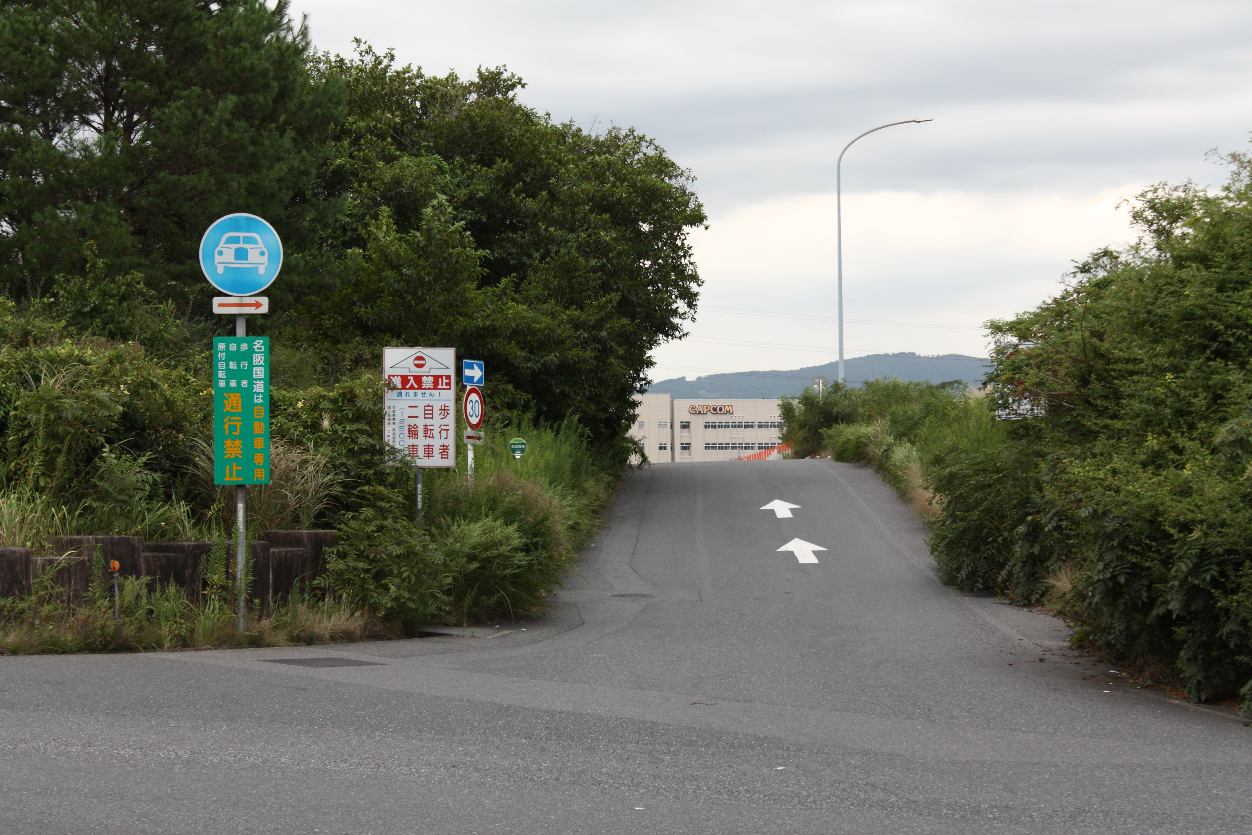 名阪国道 白樫インターチェンジ（ダイヤモンド型） 天理方面入口 三重県伊賀市白樫